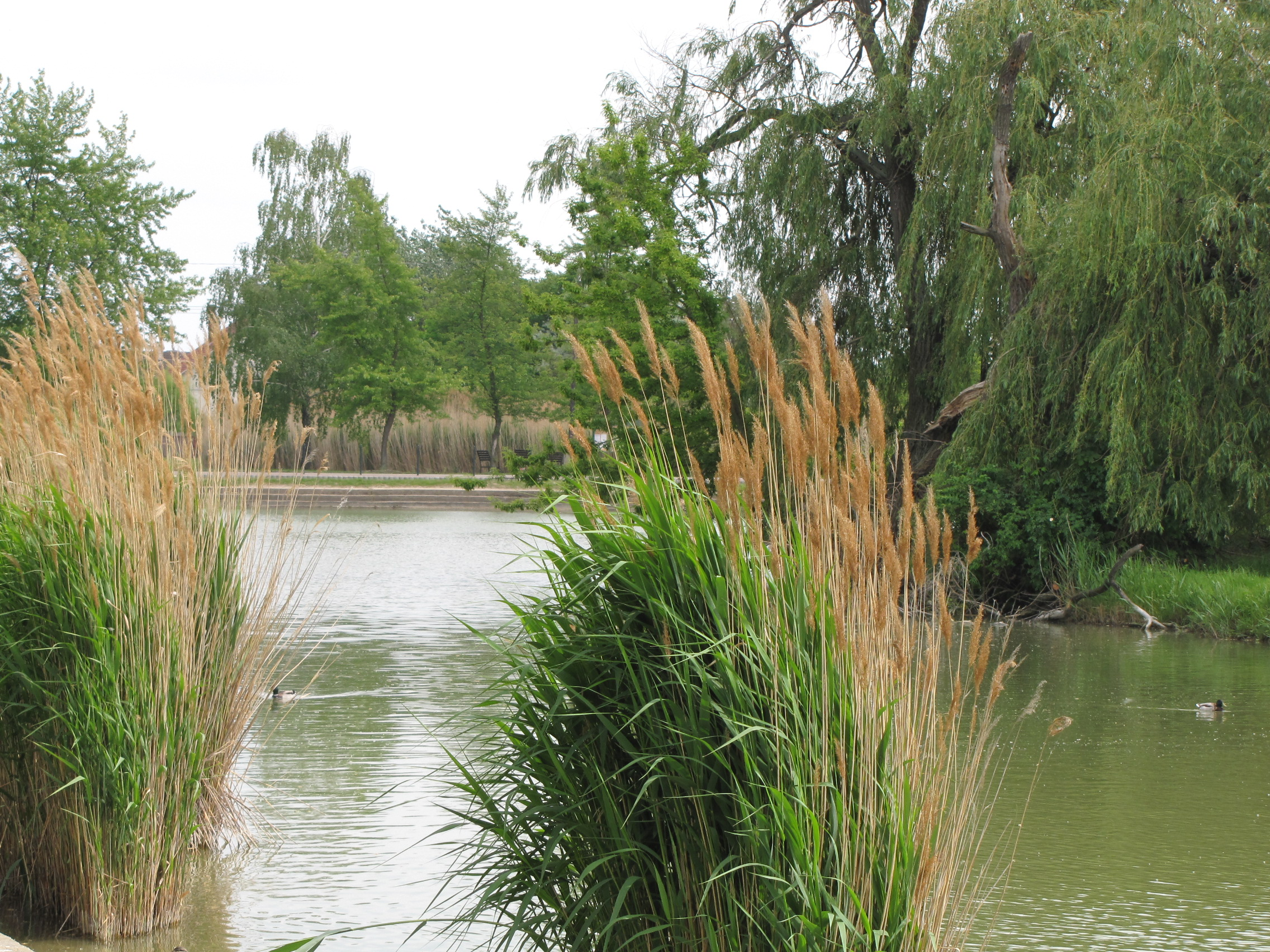 horgásztó Komáromban